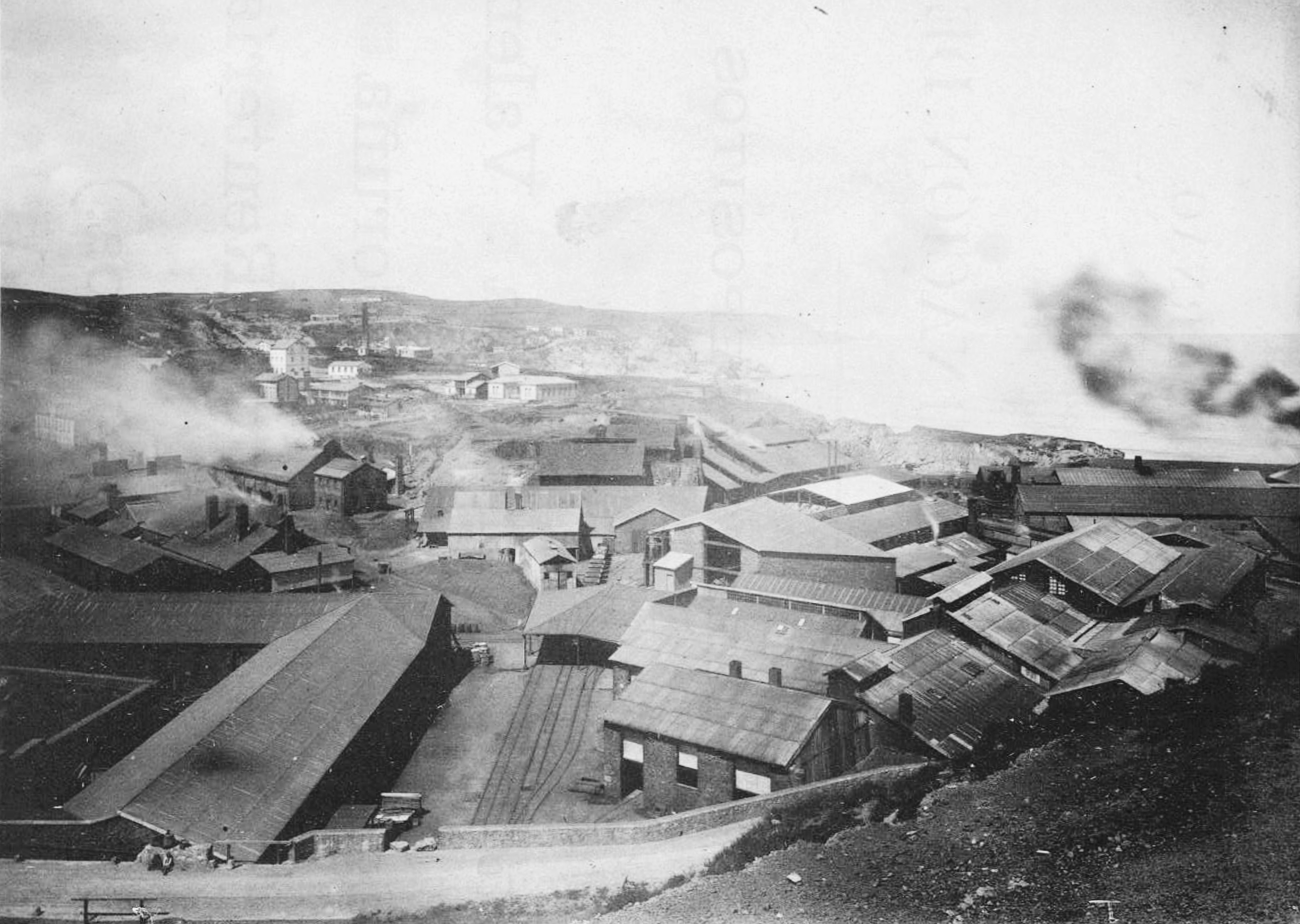 Fábrica de Arnao de la Reala Compañia Asturiana de Minas. Anuncio en Álbum anunciador 1893 : Asturias